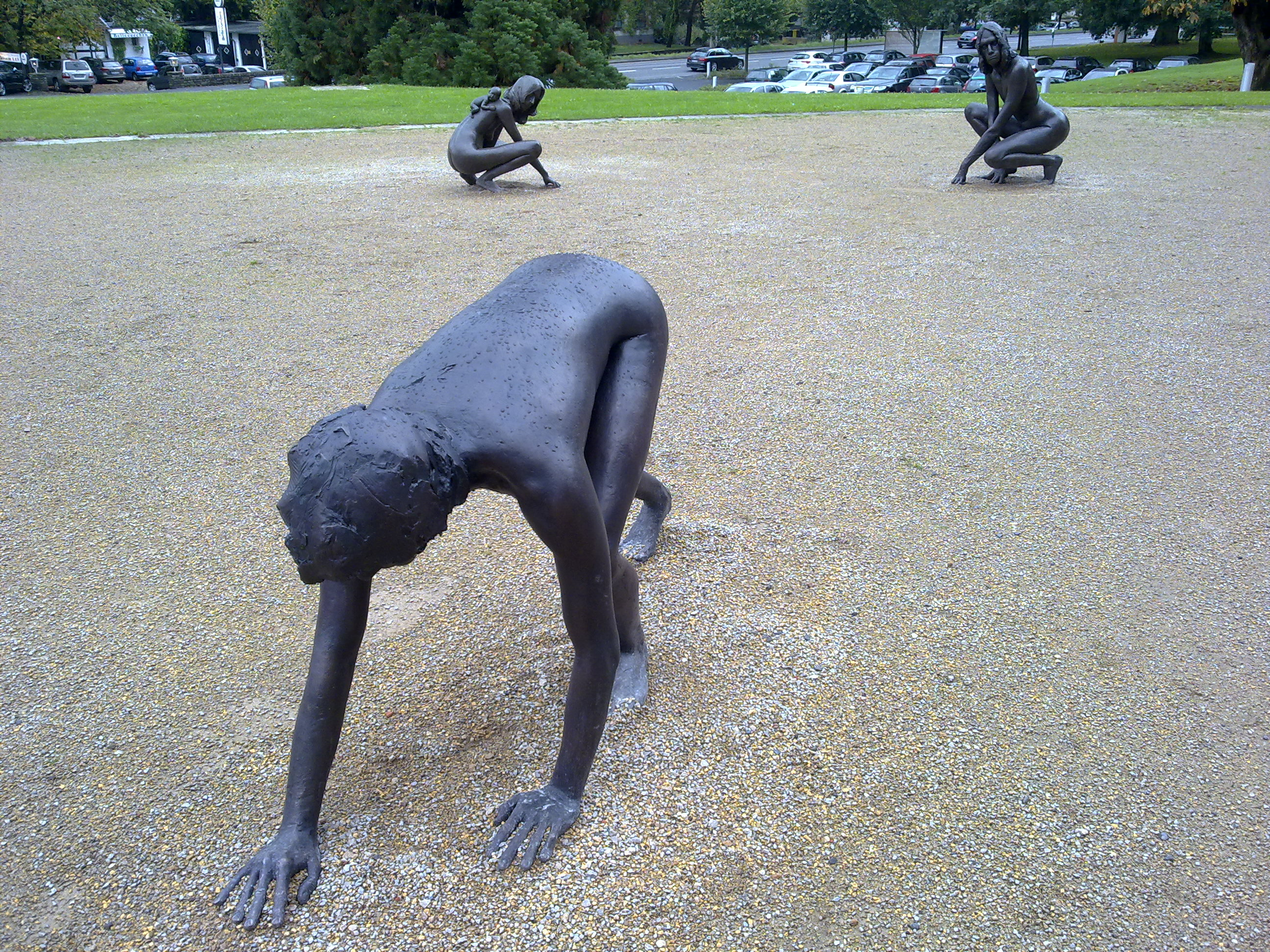 Aron Demetz: Homo Erectus (2008). Vor dem Arp Museum Bahnhof Rolandseck